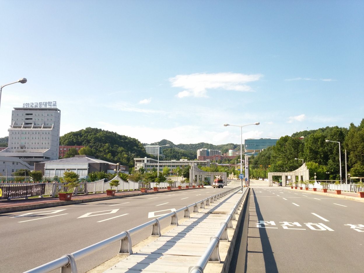 한국교통대학교 정문